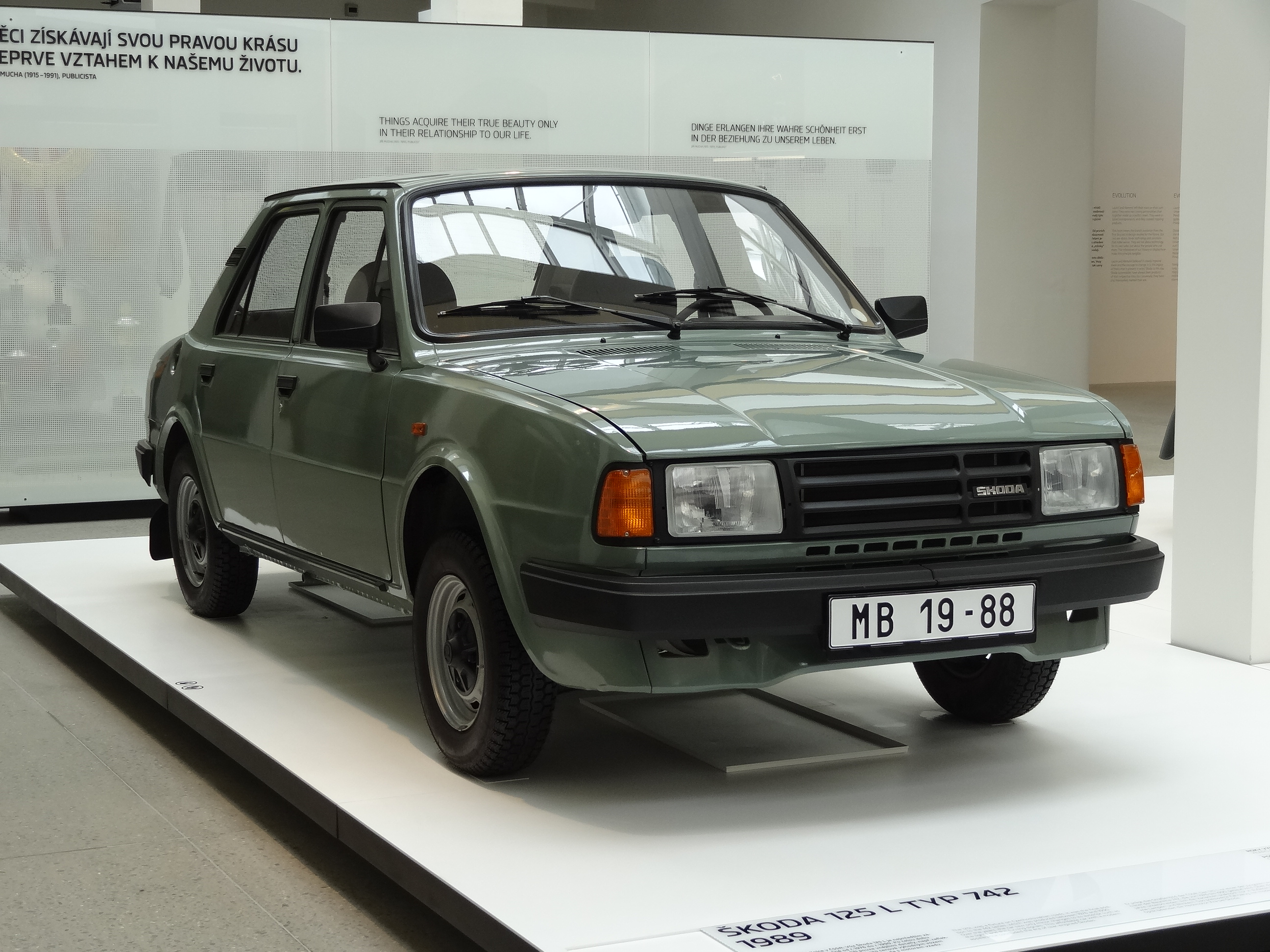 years of production: 1988-1990, cylinders: 4, displacement: 1174 ccm, output: 40,5kw (54hp), gearbox: 5+R, max speed 150 km/h"Er prägte das Straßenbild der CSSR: Der 125 L ist einer der jüngsten Vertreter der Baureihe 742, die von 1976 bis 1990 gebaut wird. Über die Jahre unterscheiden sich die Varianten praktisch nur in äußeren Details wie Lampen und Blinkern. Das preiswerte Fahrzeug mit moderner Optik beendet die Heckmotor-Ära bei Skoda" (Hinweistafel)